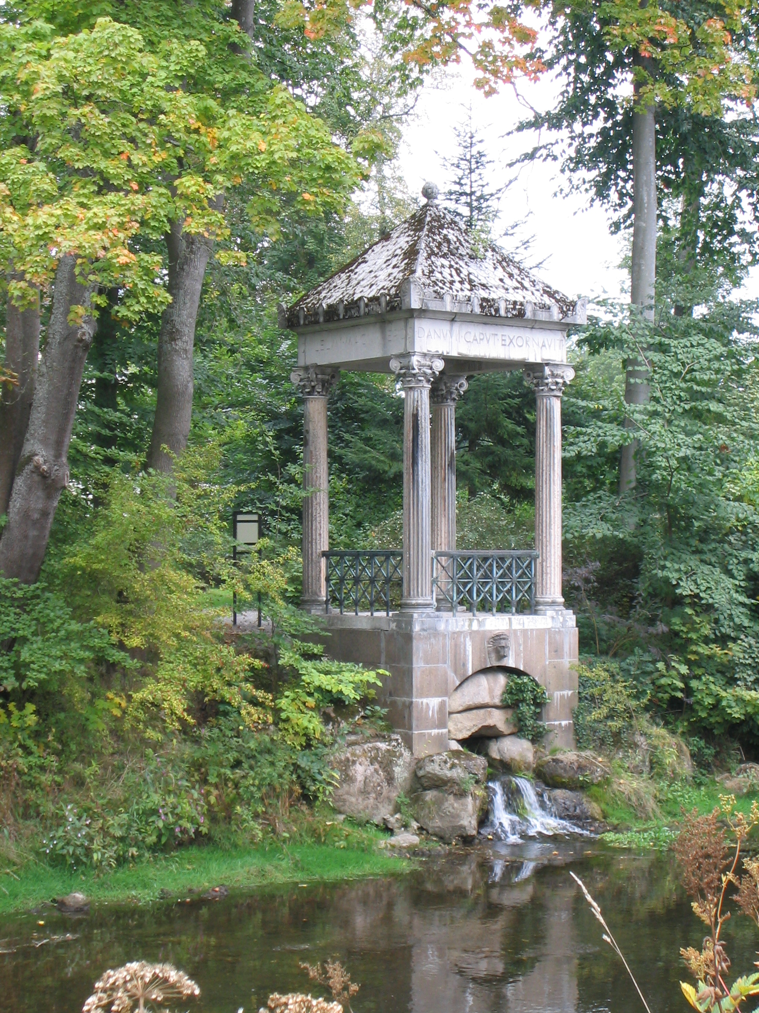 Donautempel in Donaueschingen